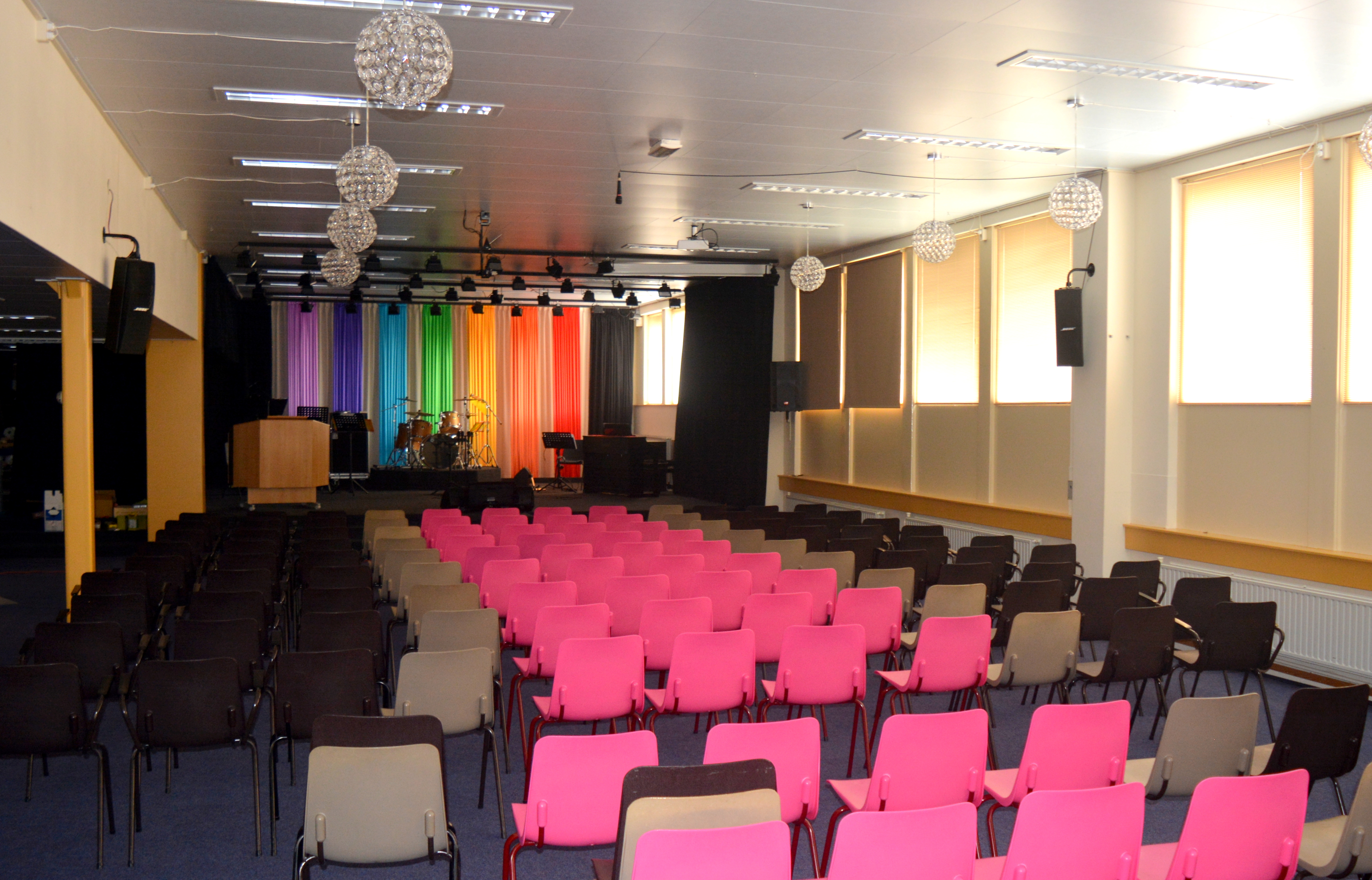 Surhuisterveen, De Vluchtheuvel, interieur